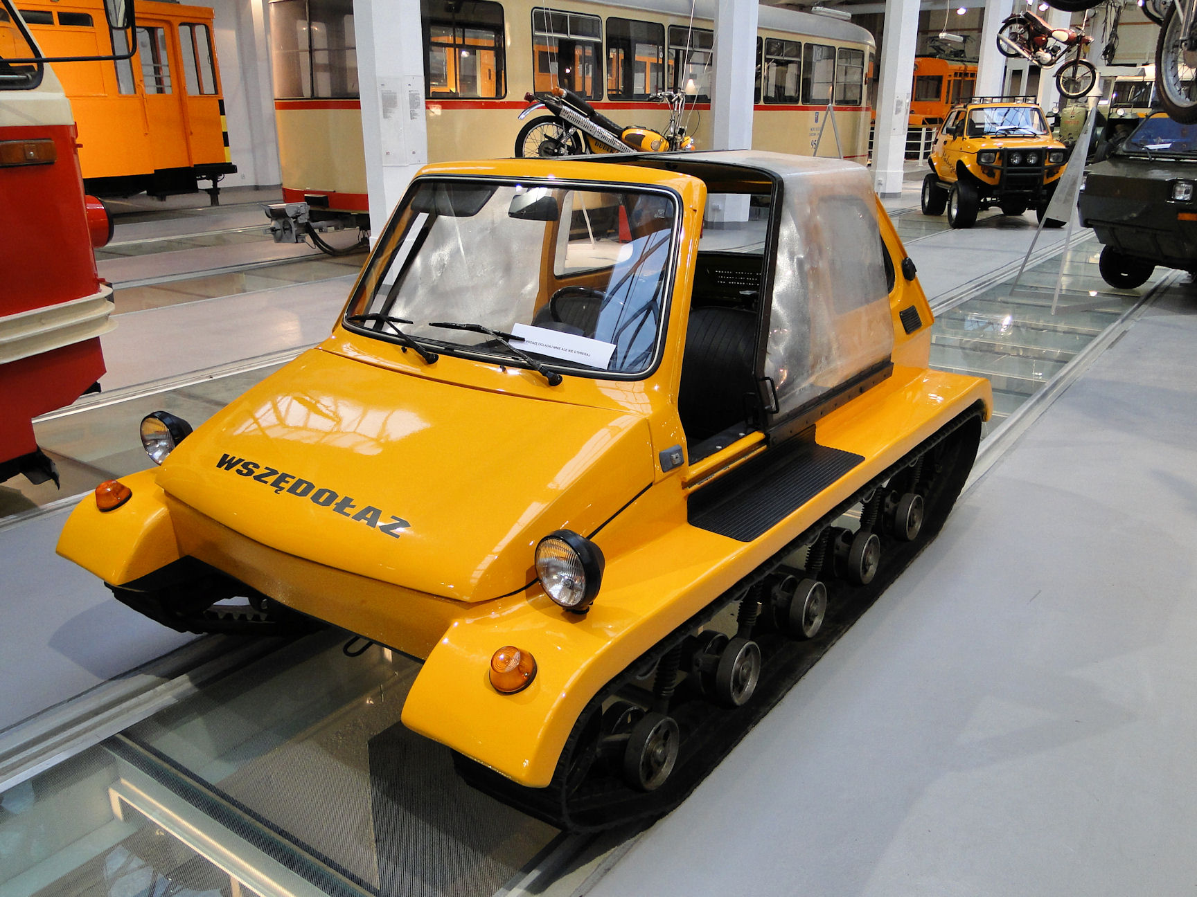 Wszędołaz - prototypowy pojazd skonstruowany na bazie Fiata 126p